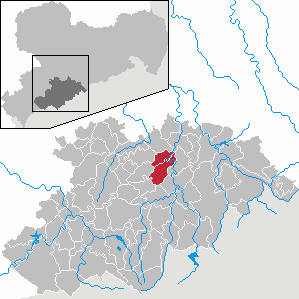 ehemaliger Verwaltungsverband Grüner Grund im Erzgebirgskreis, Sachsen